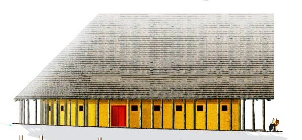 Reconstitution du palais de Vix (musée de Châtillon-sur-Seine)